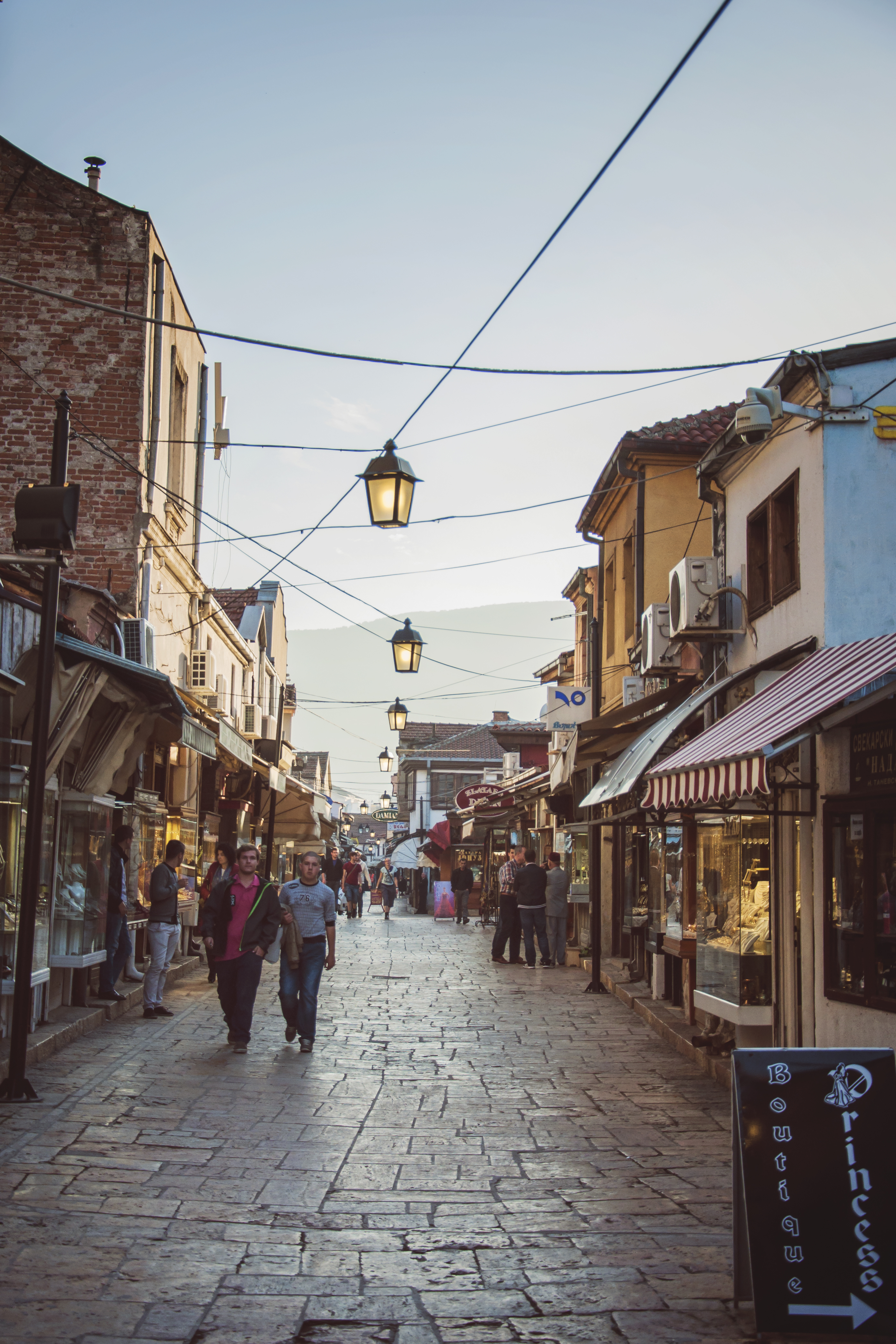 Старата скопска чаршија сликана преку ден